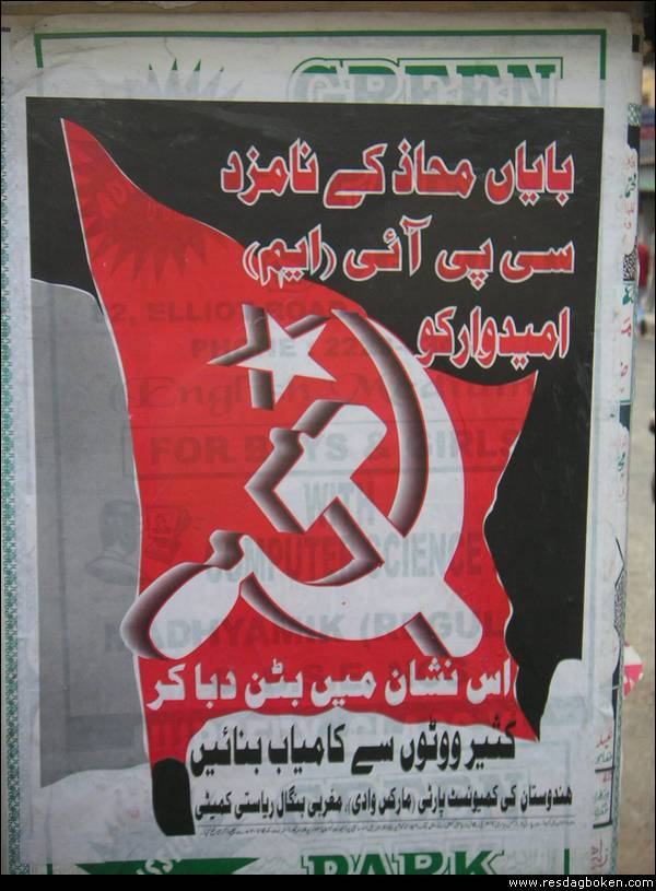 CPI(M)-affisch i Kolkata inför Lok Sabhavalet 2004. Språk urdu.